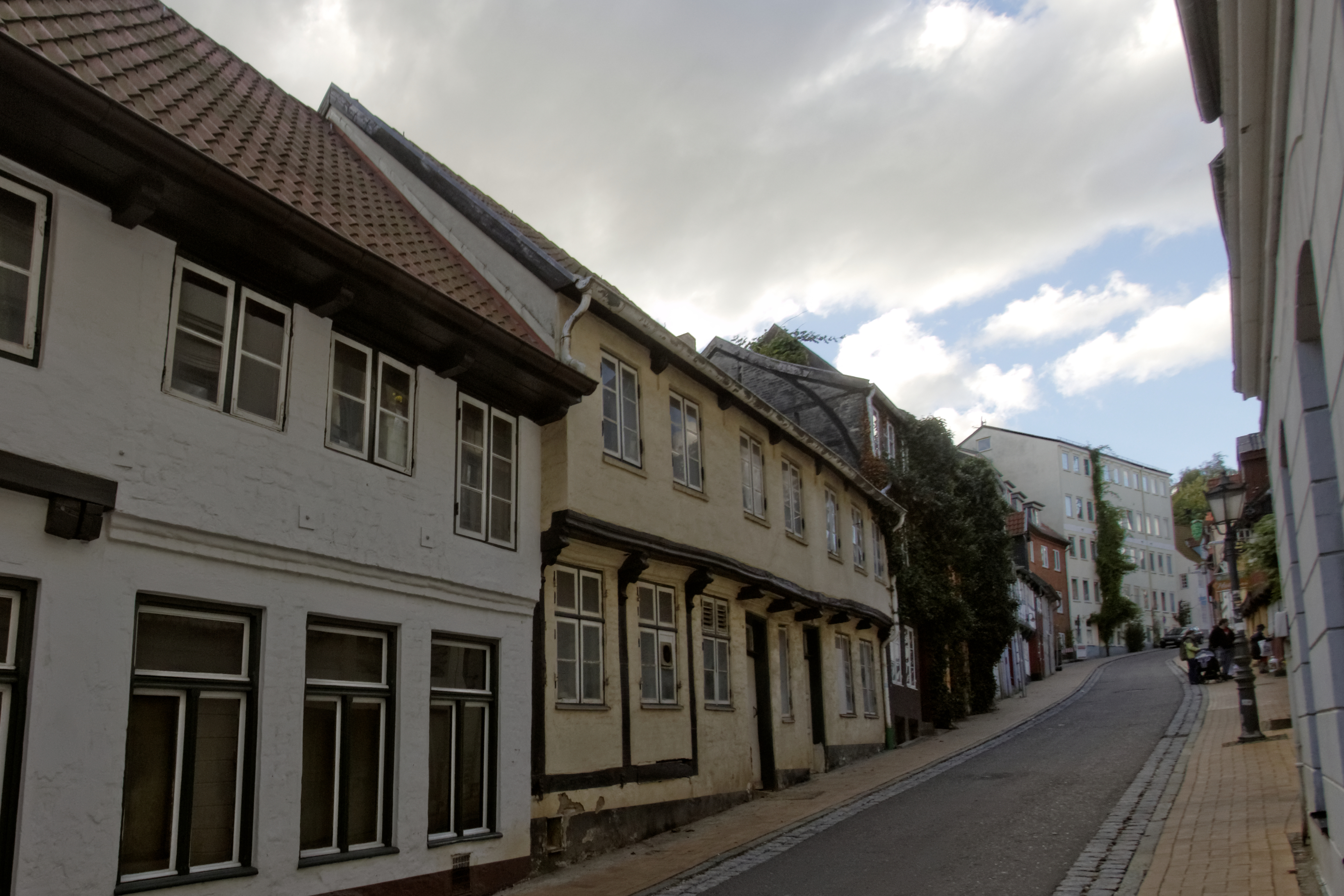 Flensburg, Marienstr. 3-5